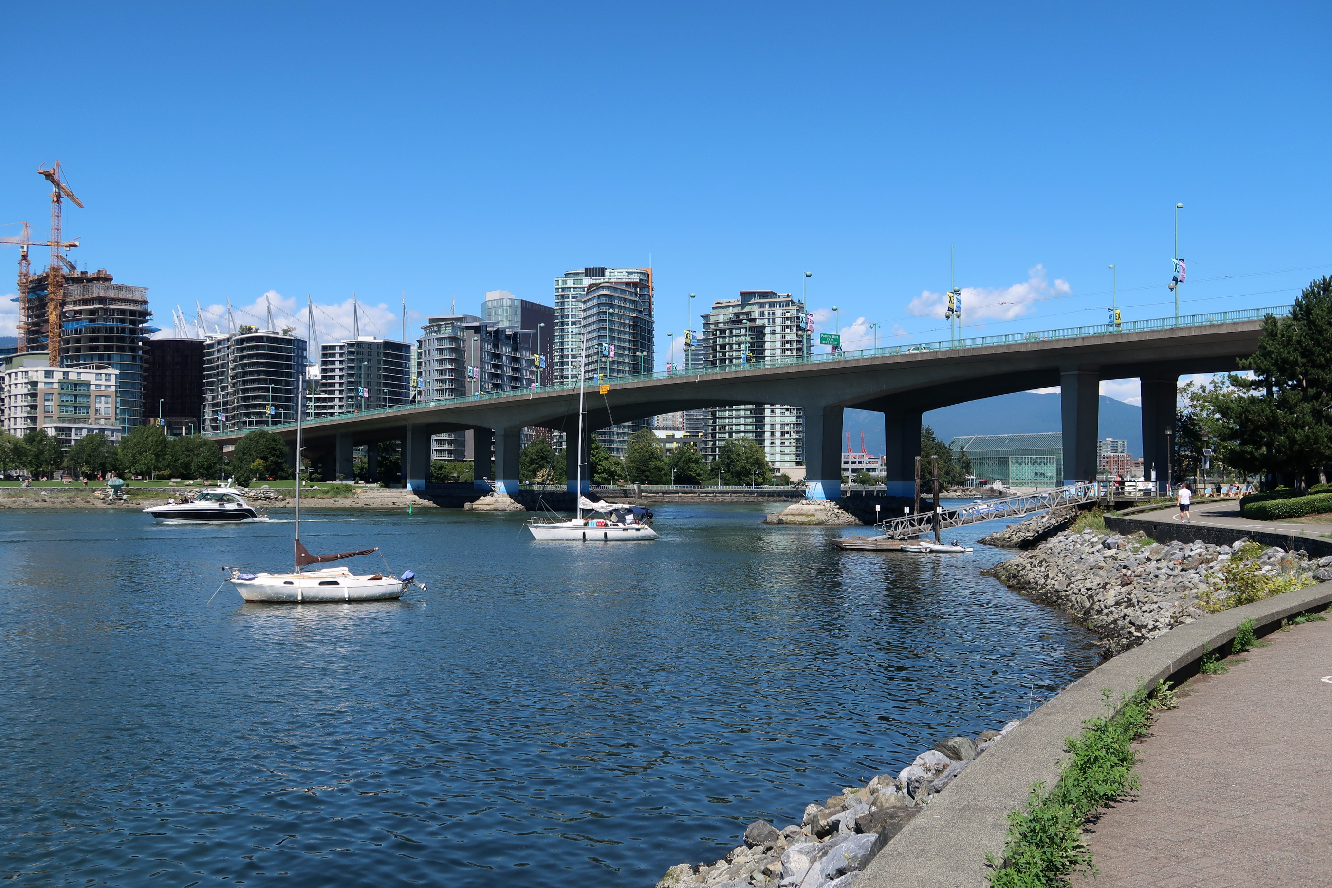 Cambie Bridge